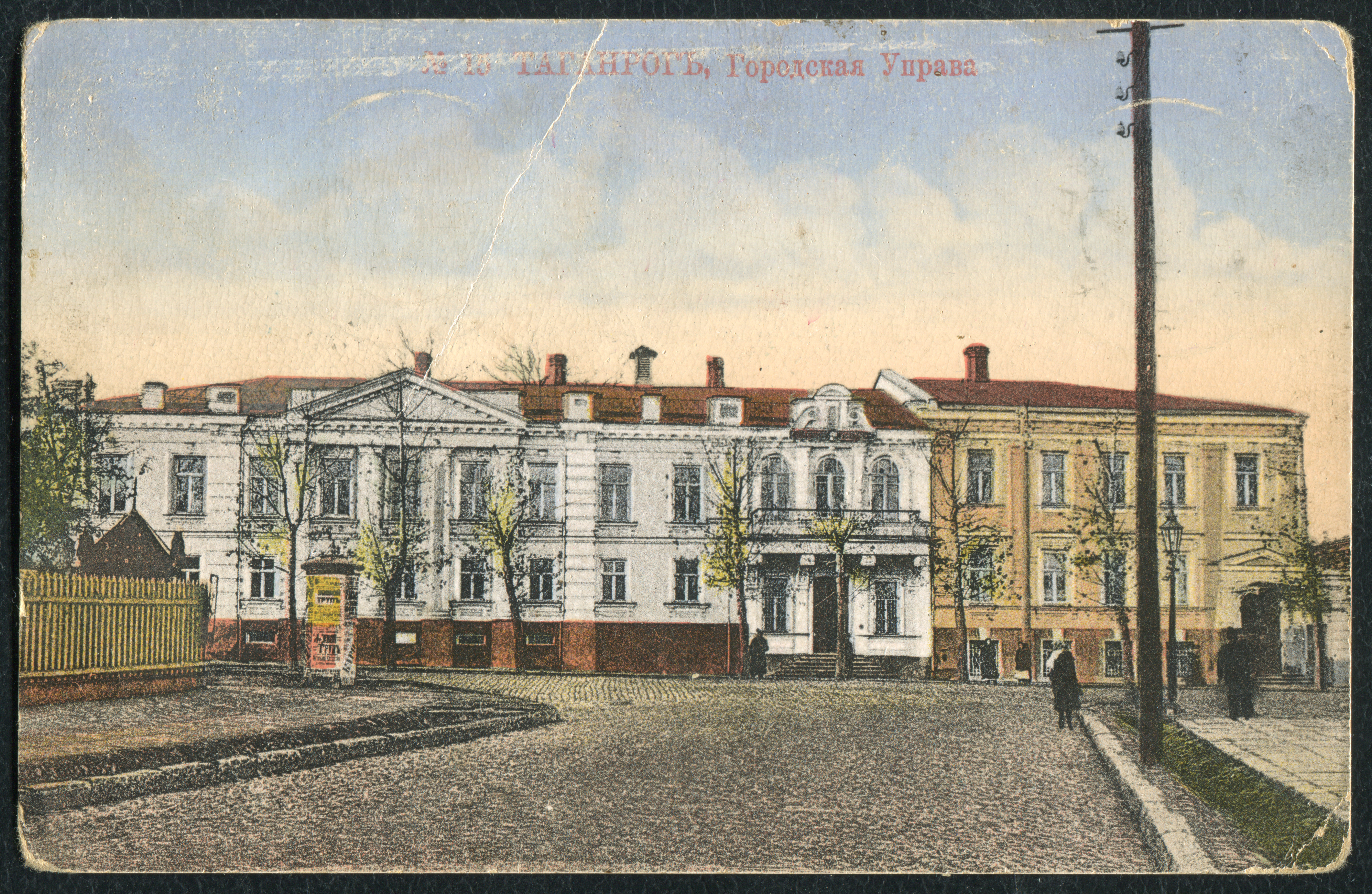 Таганрог, Здание Городской Управы. Дореволюционная открытка